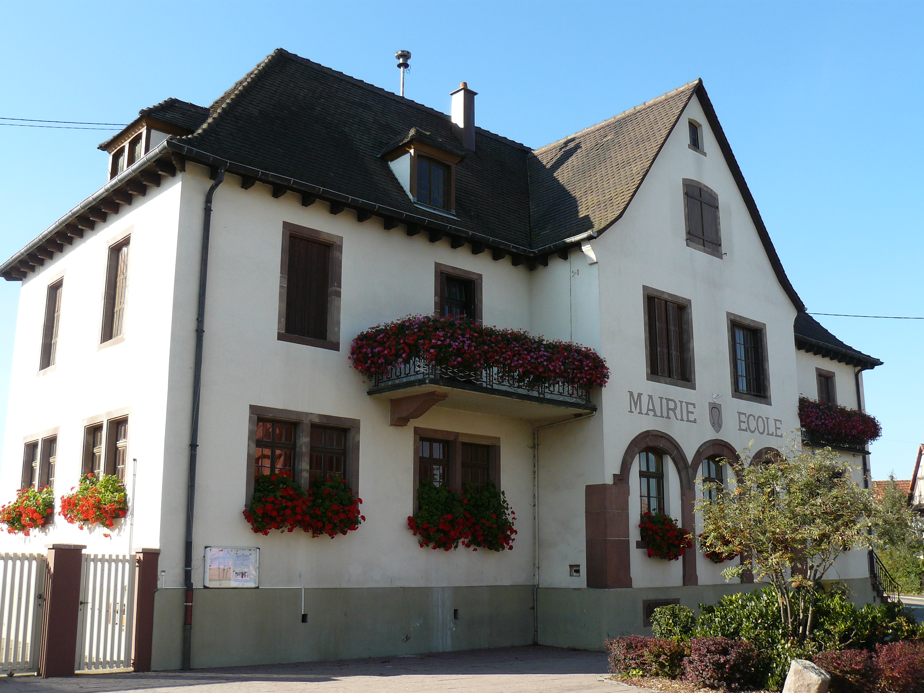 École du village